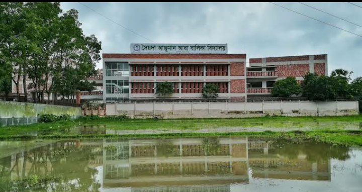 চিত্রঃ সৈয়দা আঞ্জুমান আরা বালিকা বিদ্যালয়